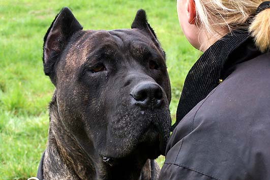 Bild zeigt AVD e.V. Importhund, Dogo Canario